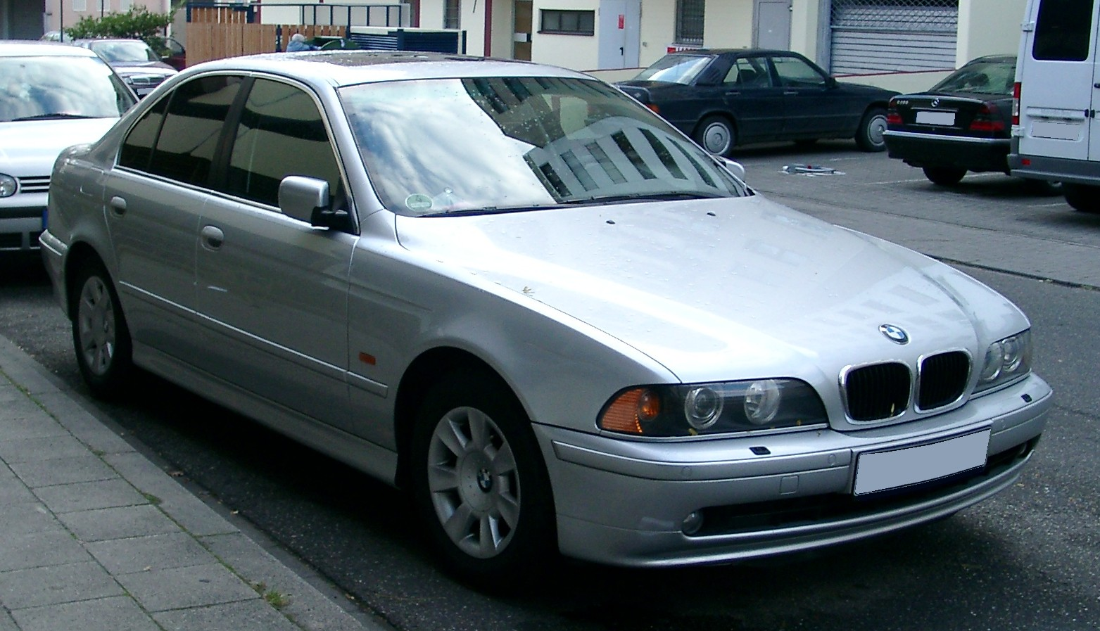 BMW E39